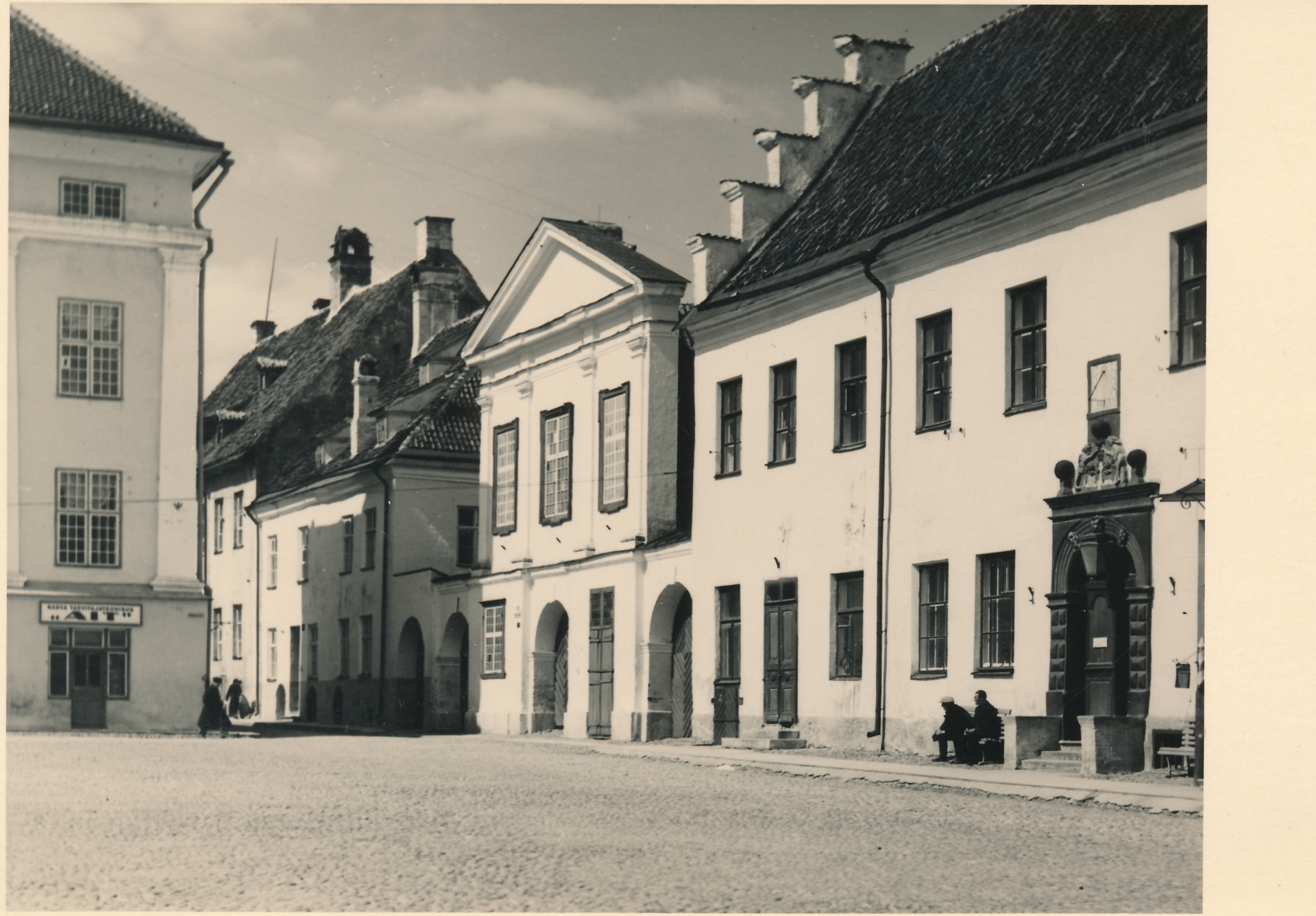 Narva raekoja plats